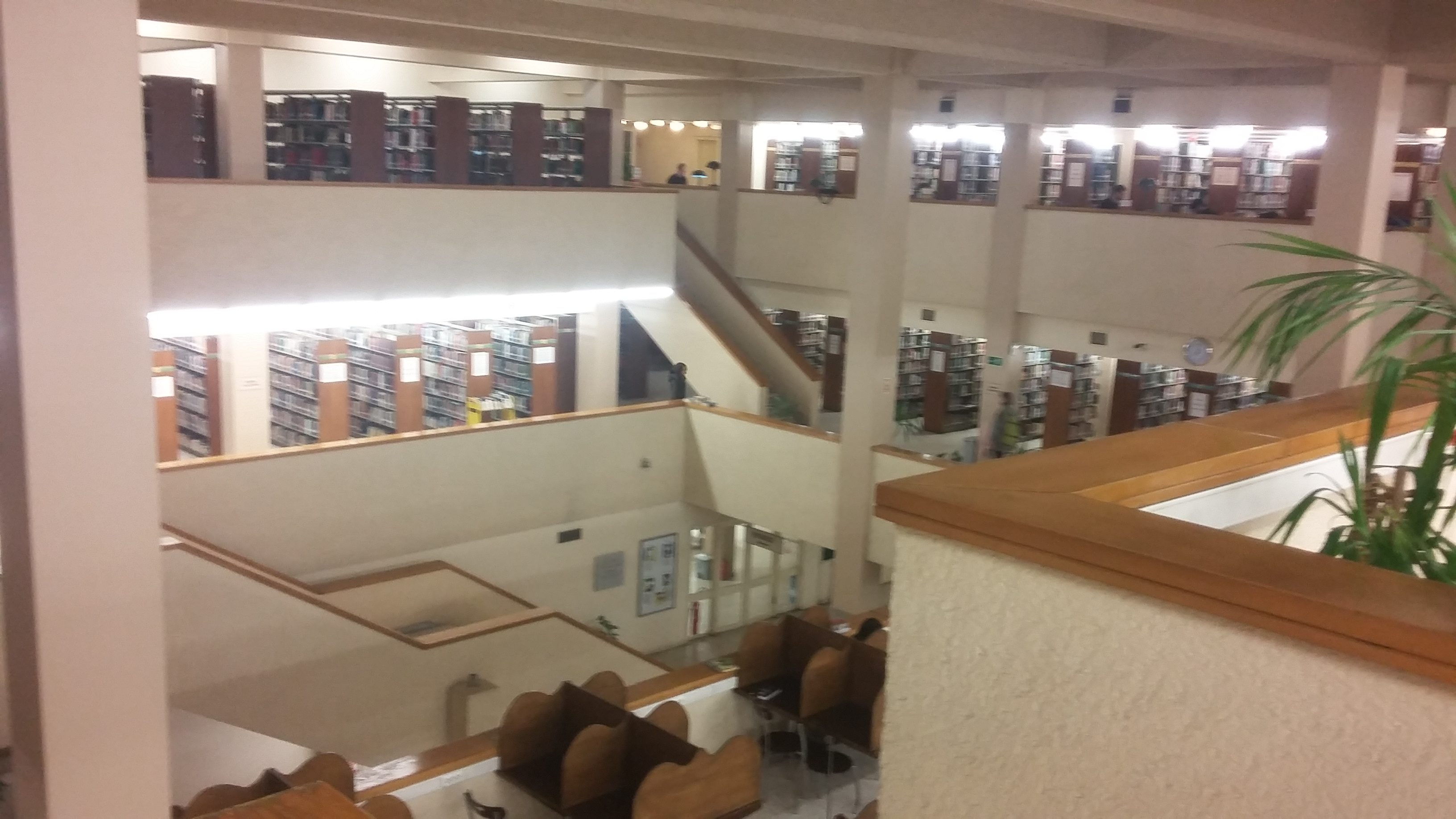 Boğaziçi Üniversitesi Aptullah Kuran Kütüphanesi ikinci kattan bir görüntü.